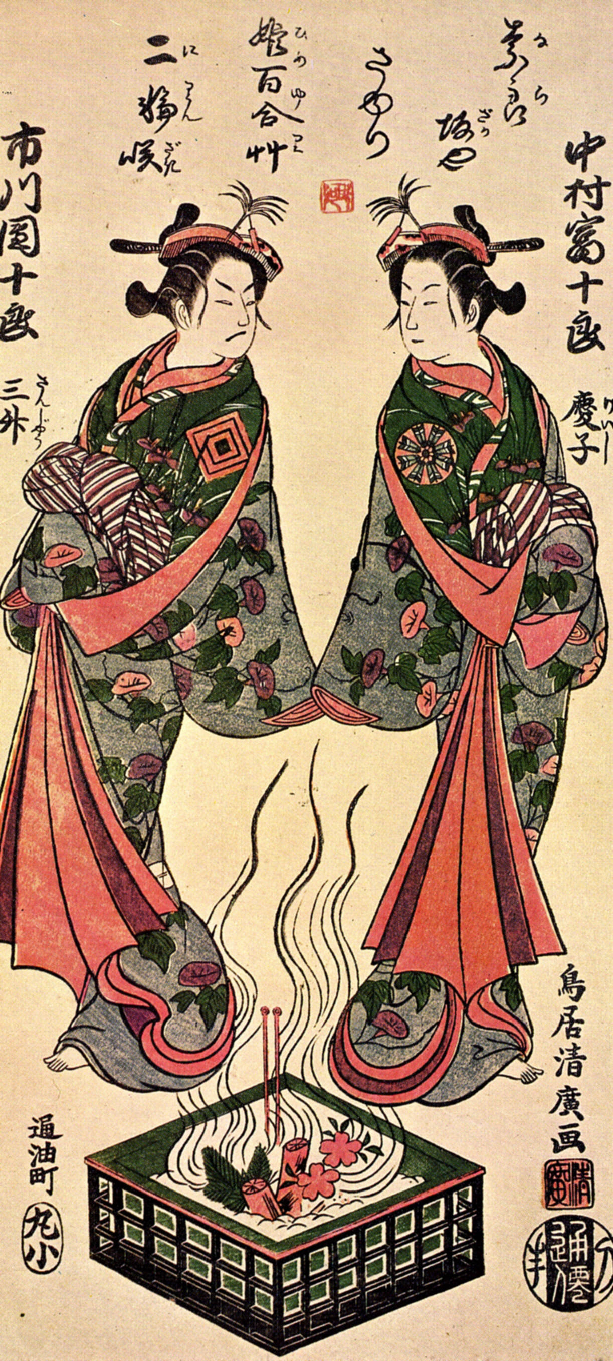 Kabuki actors Danjūrō Ichikawa IV (四代目市川團十郎, left) and Tomijūrō Nakamura I (初代中村富十郎). Color on silk.